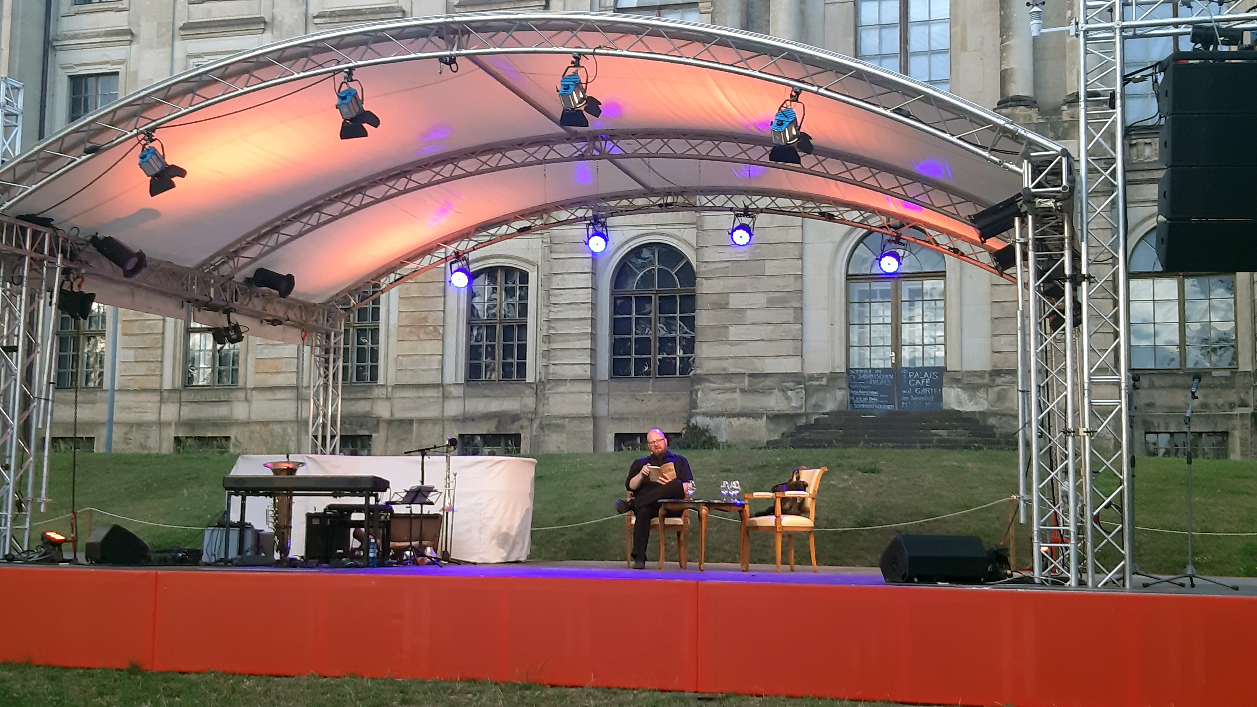 Christian von Aster beim Palais-Sommer in Dresden 2020